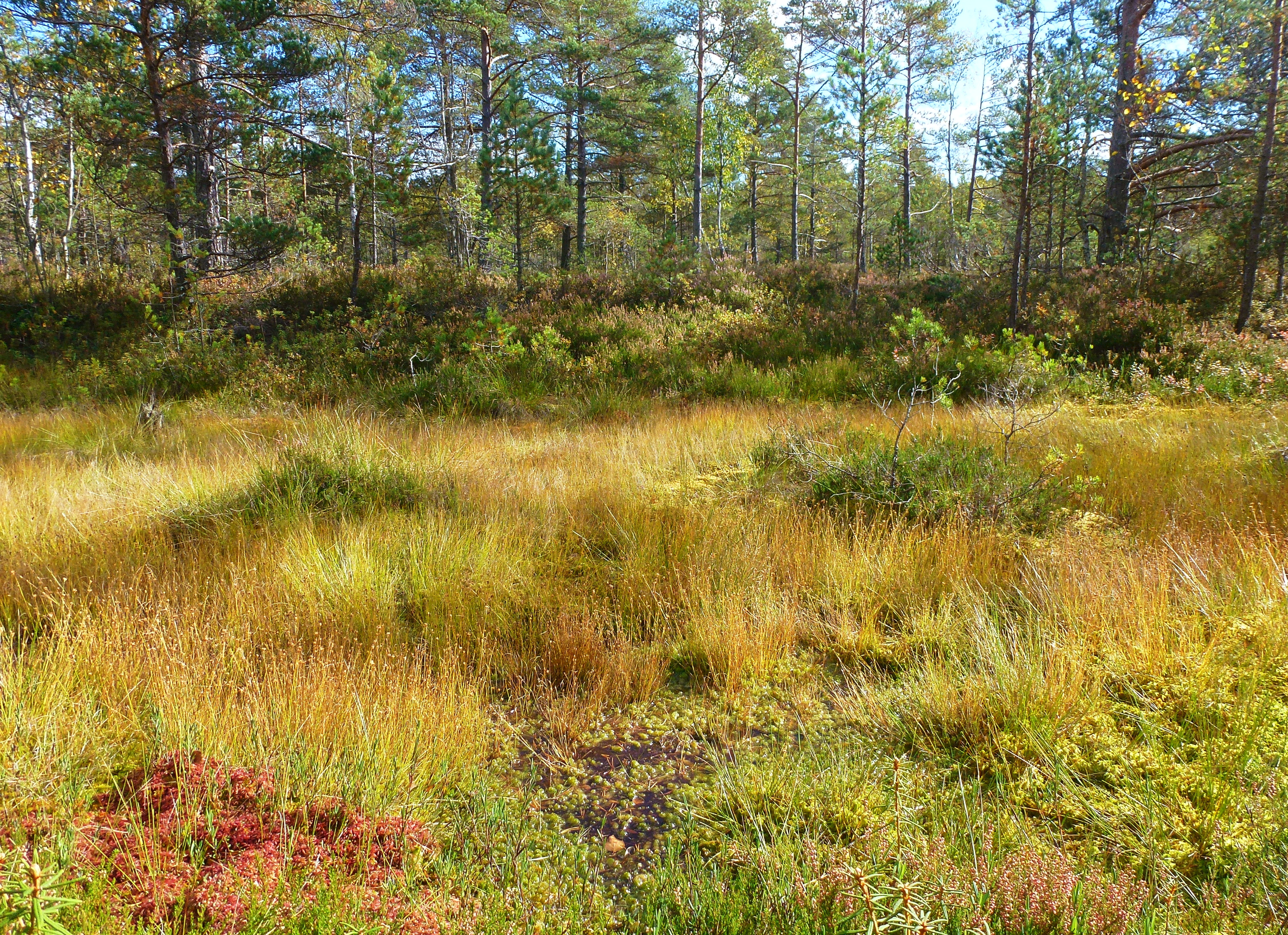 Naturreservatet "Älta mosse - Strålsjön" och "Strålsjön - Erstavik"